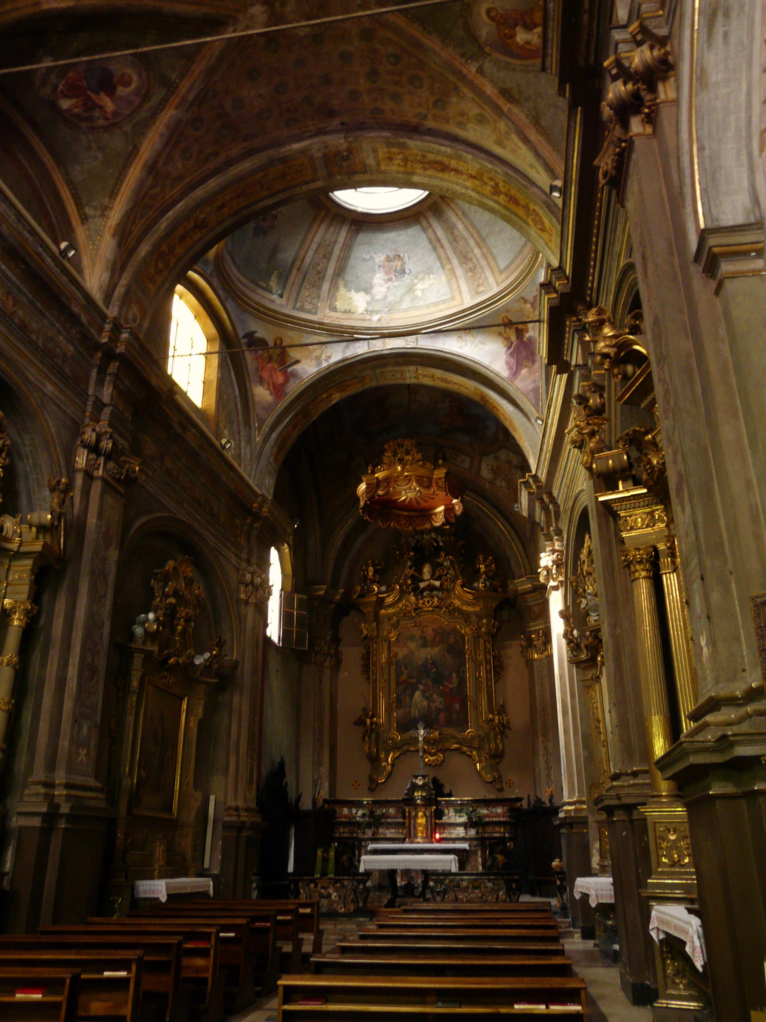 Interno della chiesa di San Ulderico, Ivrea, Piemonte, Italia